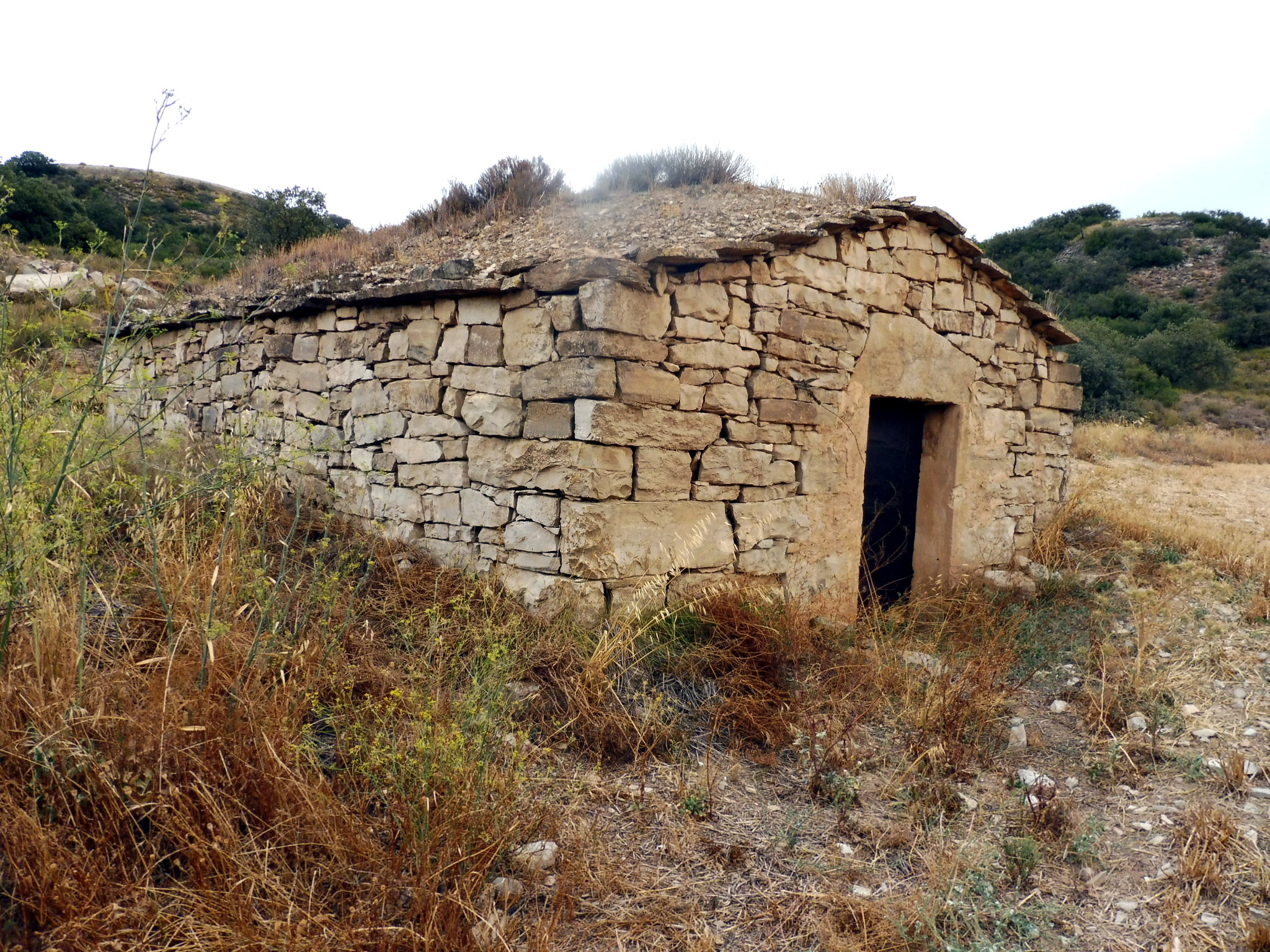 Cabana de volta de Cal Foguet (Granyena de Segarra) This is a a photo of a natural area in Catalonia, Spain, with id: ES510254